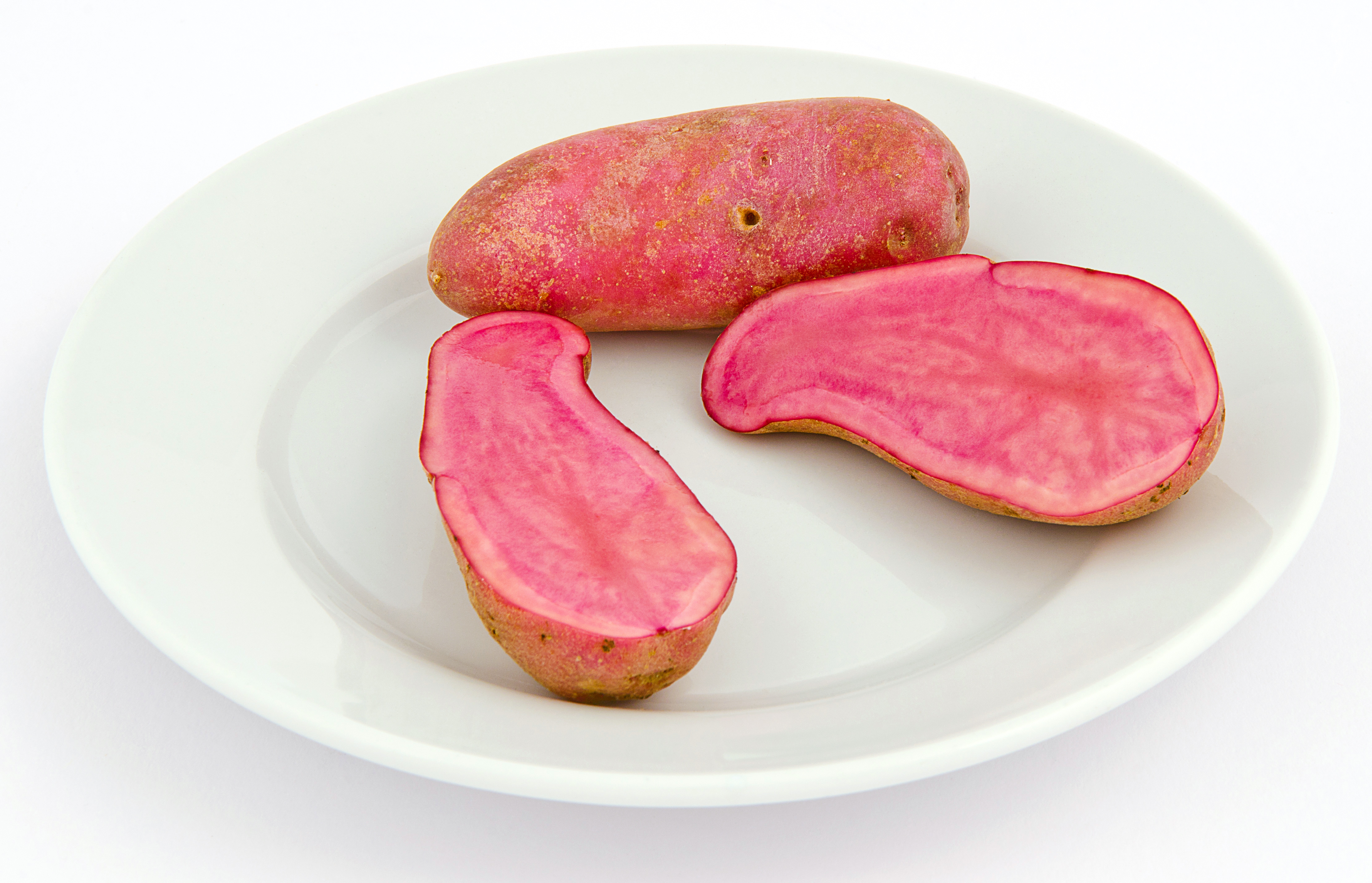 rote Kartoffeln der Sorte "Rote Emmalie", Züchter: K. Ellenberg, Deutschland